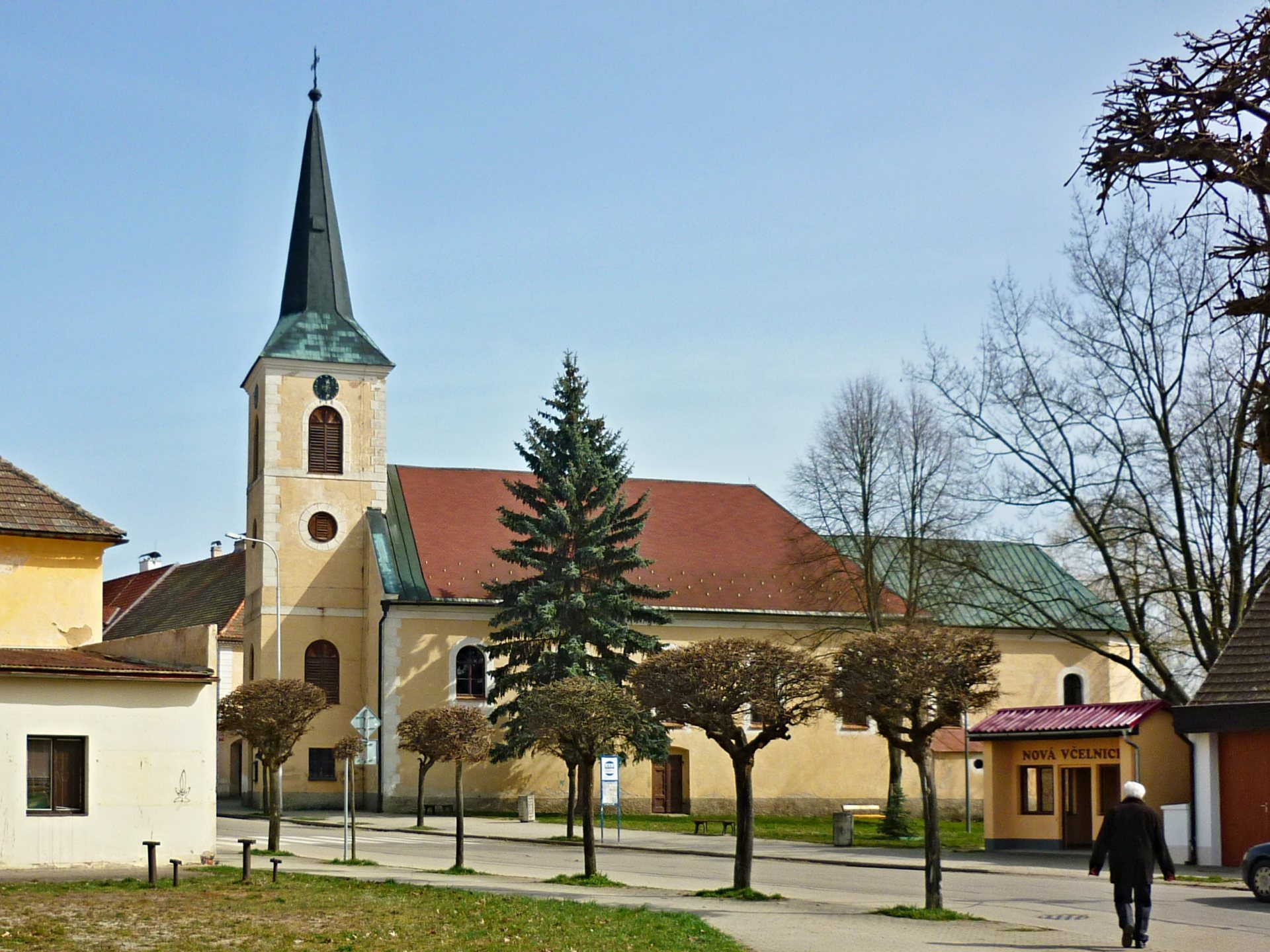 Nová Včelnice, kostel Nanebevzetí Panny Marie